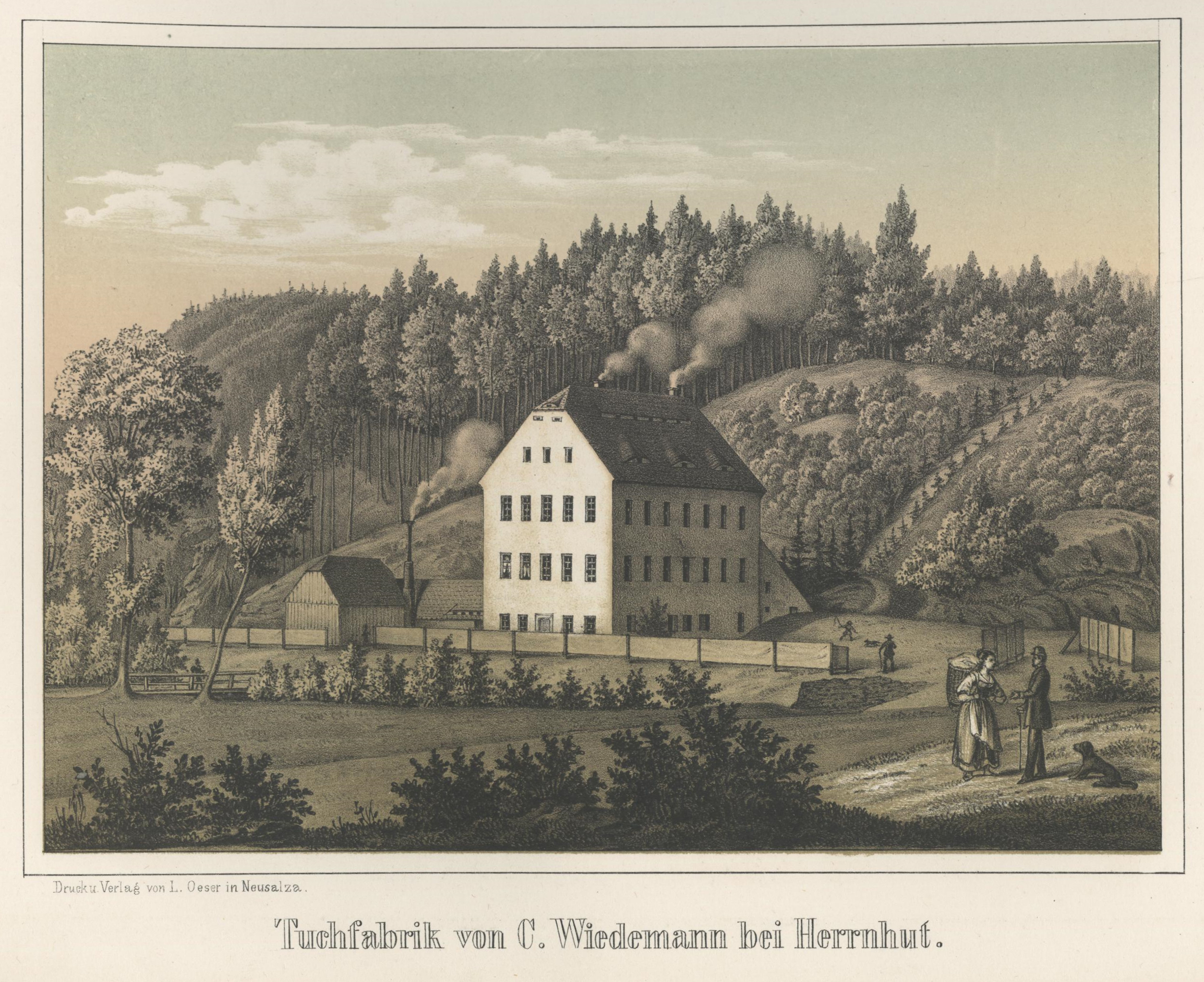 Tuchfabrik von C. Wiedemann bei Herrnhut (Erster Band)